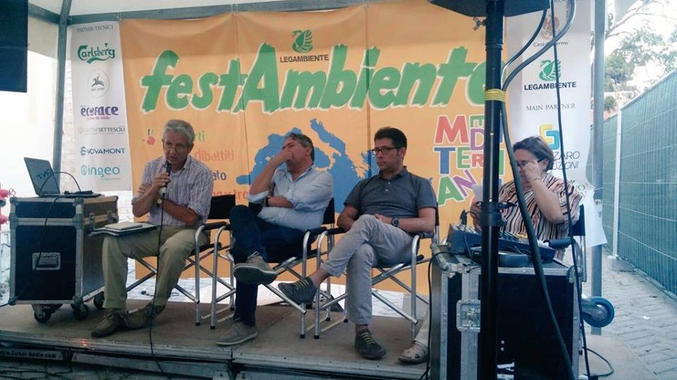 Dibattito sulle migrazioni con Legambiente, Arci, SOS Med e Caritas a Festambiente Mediterraneo, Cantieri Culturali alla Zisa, Palermo